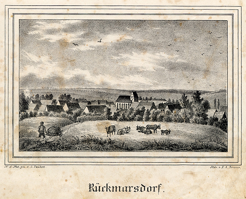 Rückmarsdorf, Lithographie von F. A. Renner nach Zeichnung von Gustav Täubert, um 1850